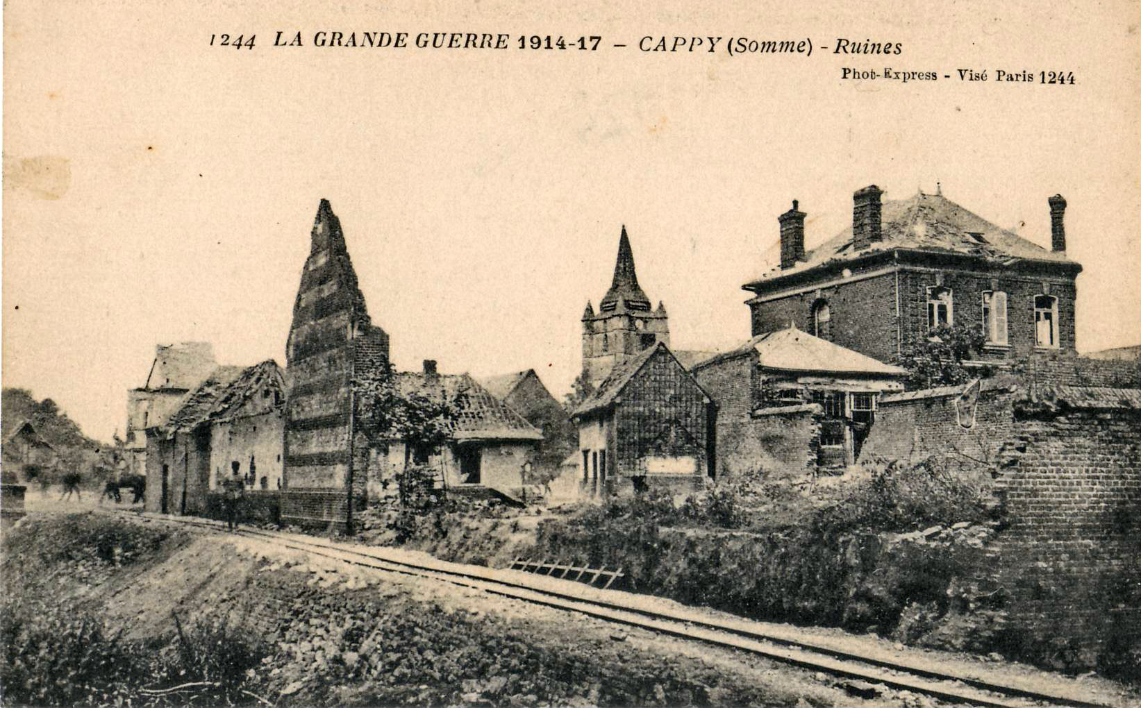 Carte postale ancienne éditée par Phot. Express, avec mention de censure à Paris n°1244, Série La grande guerre 1914-1917 :CAPPY - Ruines